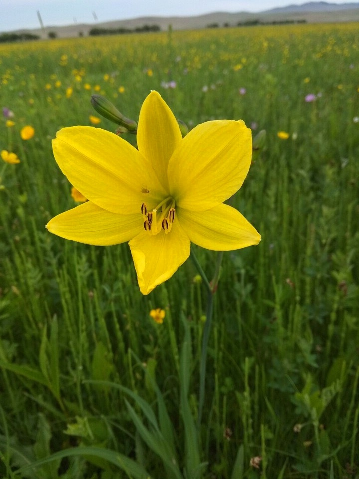 Lily growing in Eastern Siberia